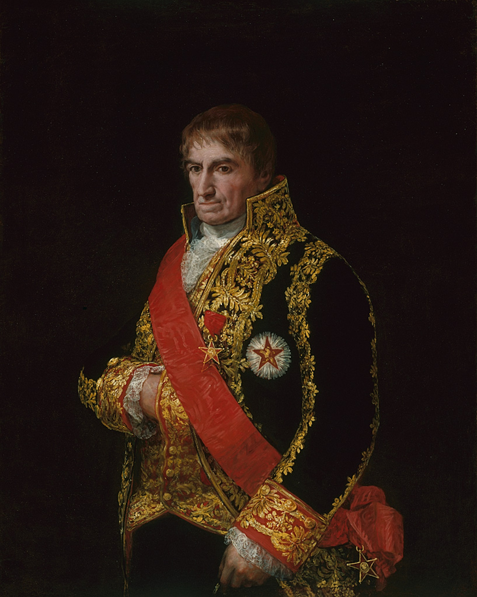 Francisco de Goya, Manuel Romero Echalecu, ministro de José Bonaparte, c. 1810. Óleo sobre lienzo, 105 x 84 cm, Chicago, Art Institute of Chicago. El anciano político Manuel Romero Echalecu (1793-1813) retratado por Goya luce la banda y la medalla de la Real Orden de España, instituida por José Bonaparte, distinción que le fue concedida por sus servicios como ministro del Interior en 1809.